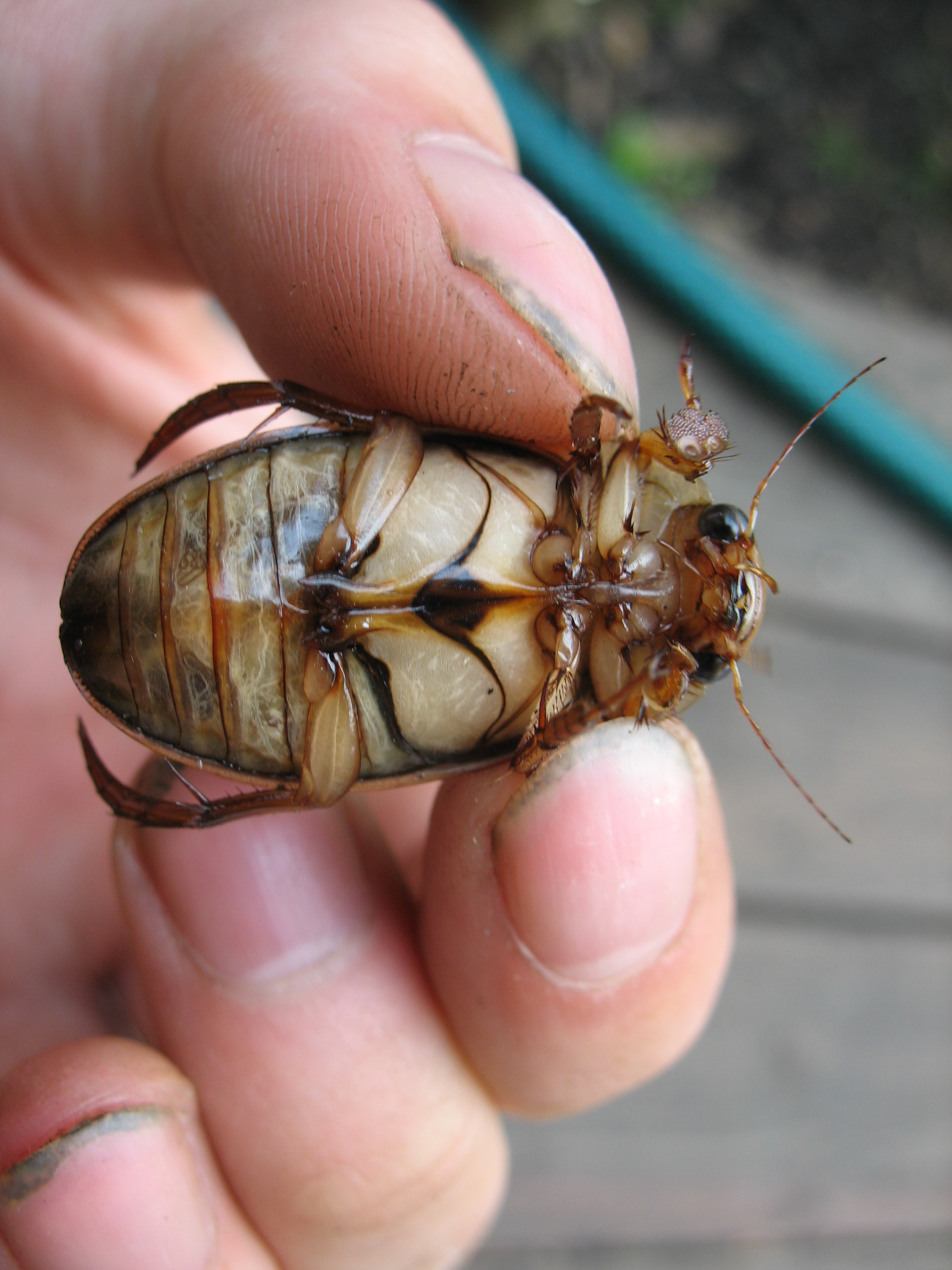 Окаймленный плавунец, г.Екатеринбург 2010, вид снизу